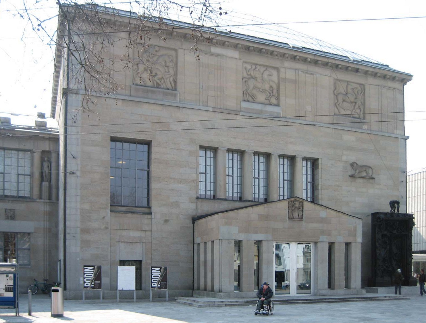 Kunsthaus_ Zürich, März 2007